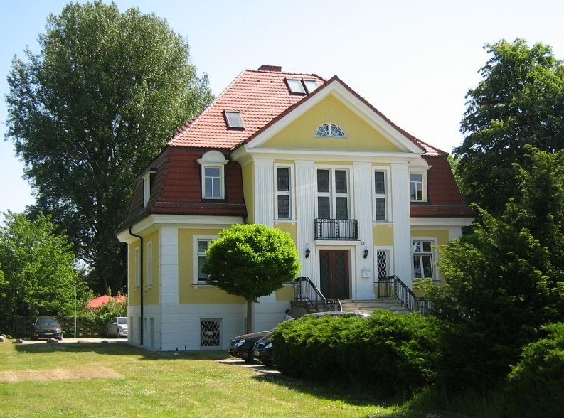 Villa Windbergsweg 12 im Kulturpark in Neubrandenburg